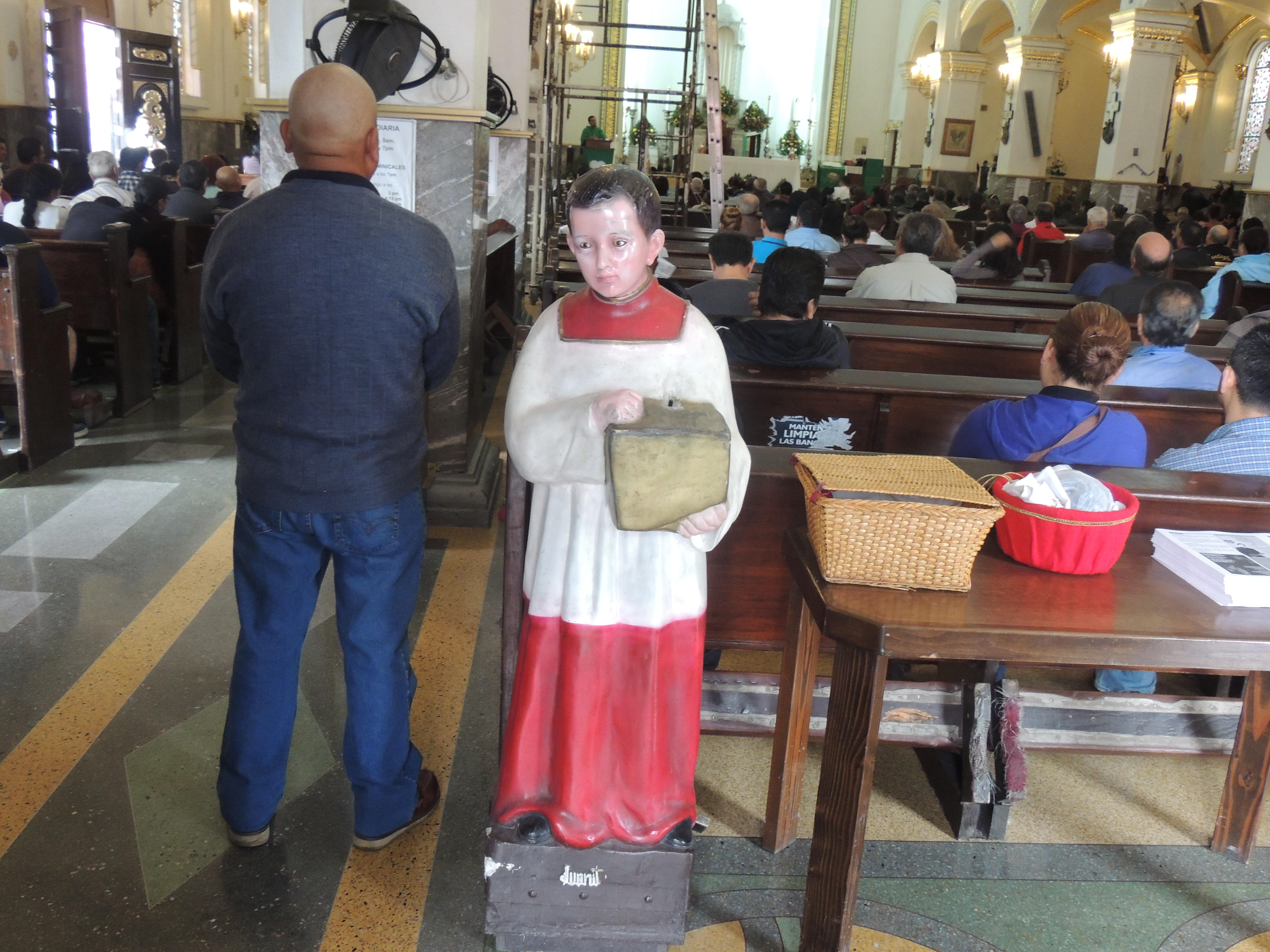 Alcancia de Juanito